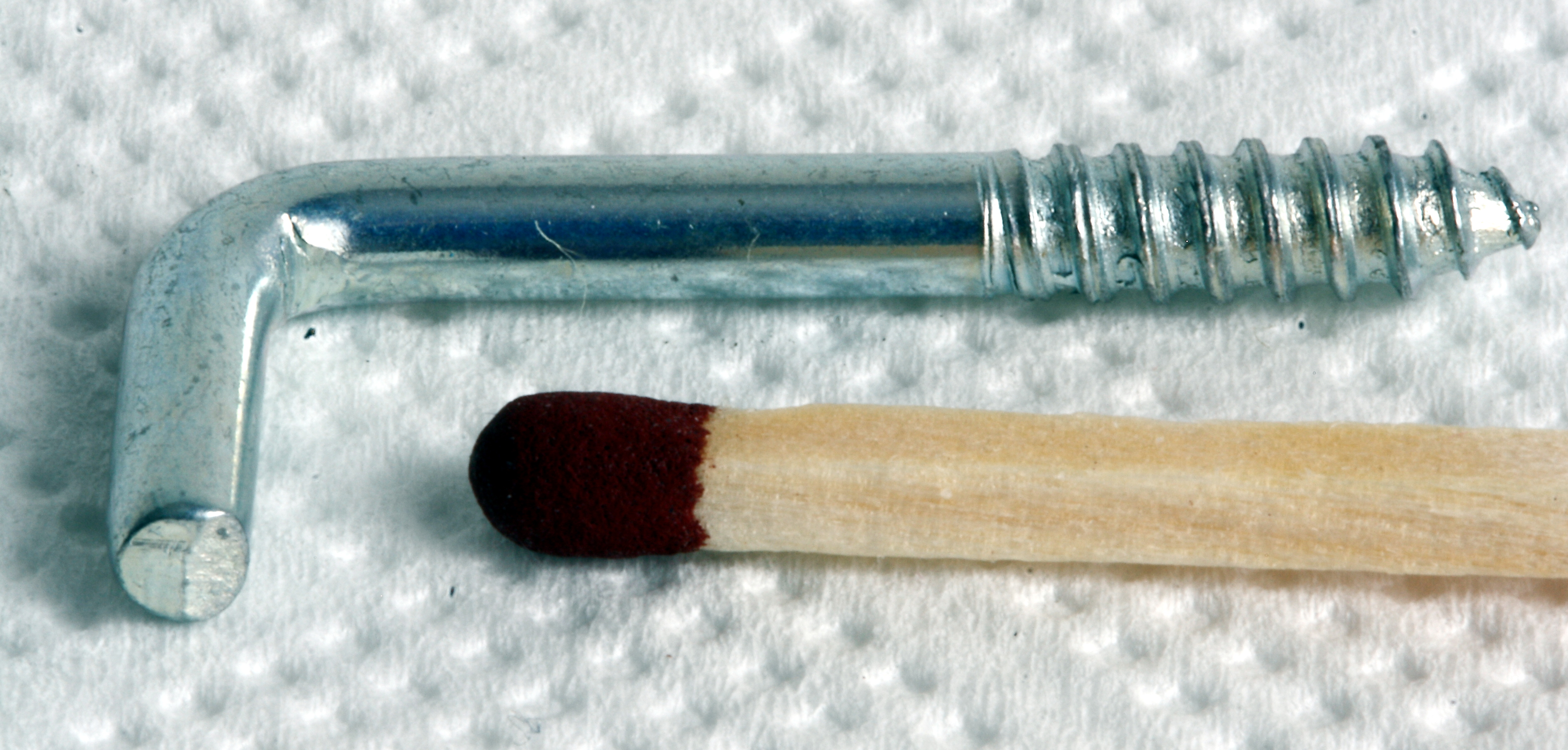 Gerader_Schraubhaken,_Holzgewinde,_Stahl,_verzinkt